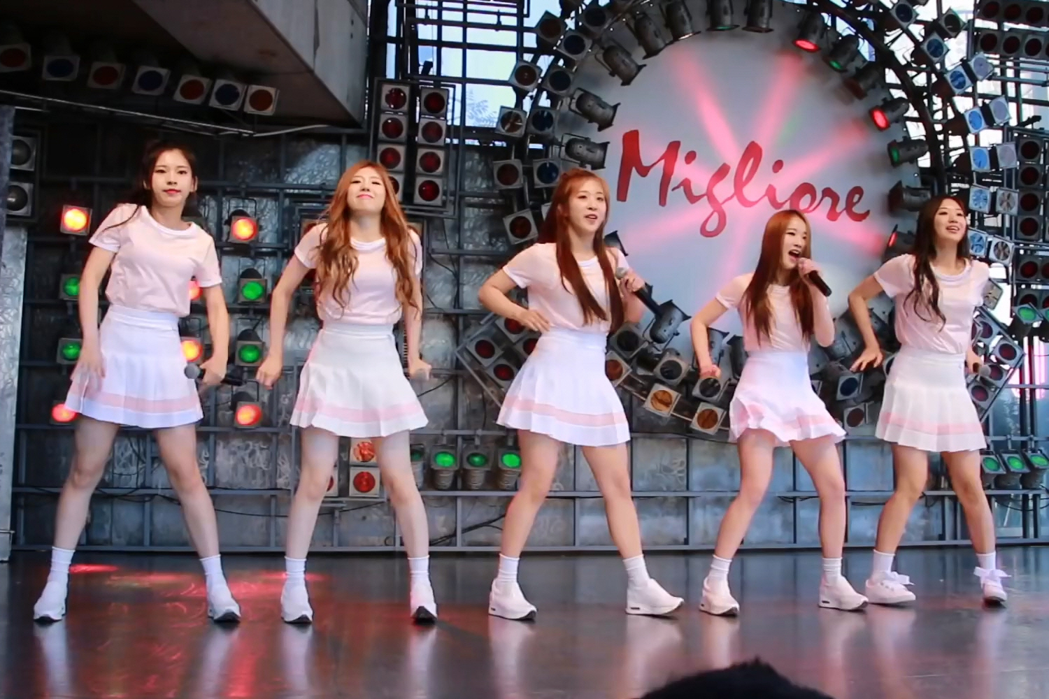 170521 애플비(Apple.B)-Fullcam Nocut (동대문 밀리오레 버스킹) 직캠 by 포에버 48s